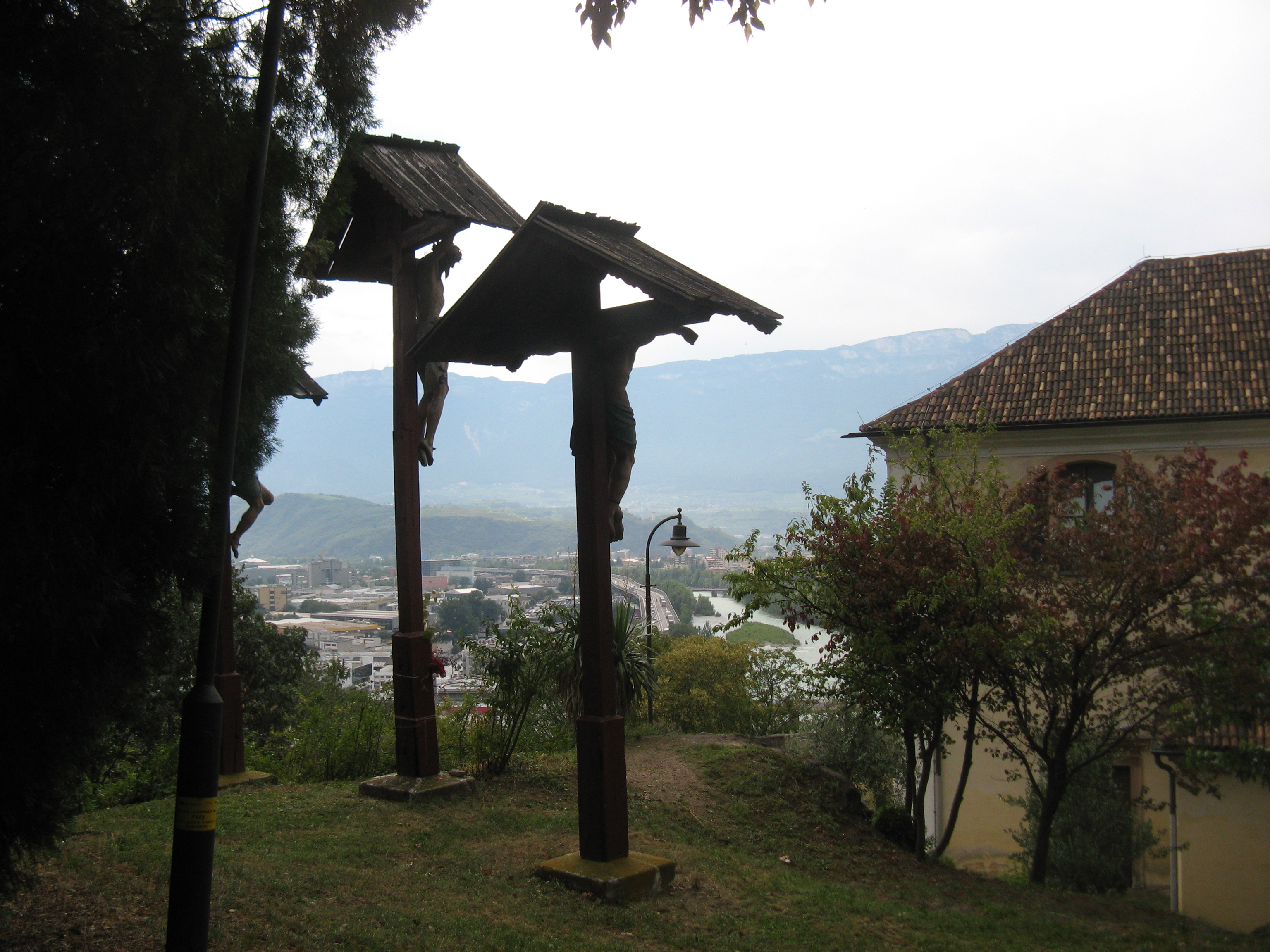 Heiliggrabkirche mit Kreuzigungsgruppe, Bozen